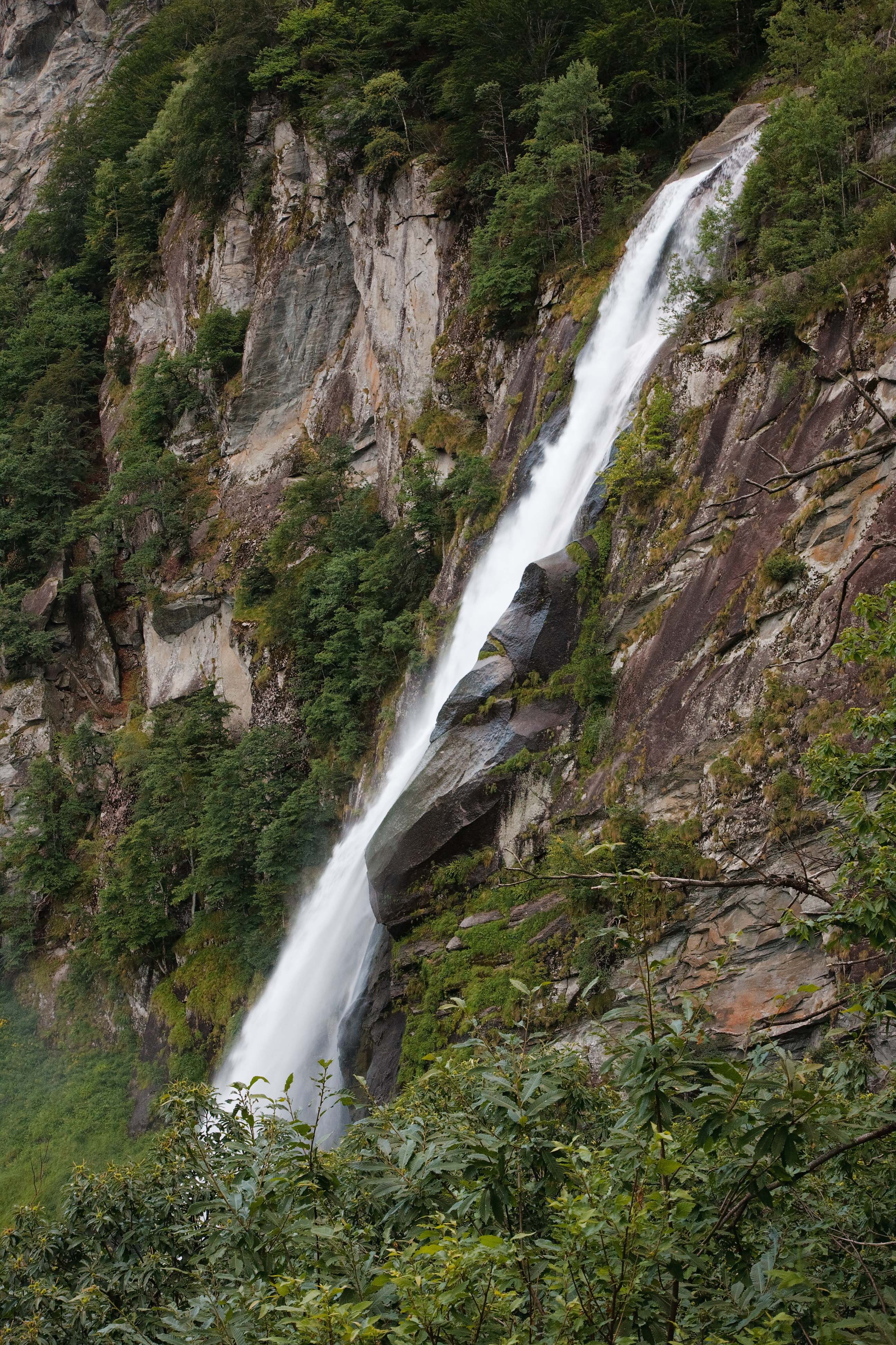 Der Fiume di Calnègia stürzt bei Foroglio aus dem Calnègiatal ins Bavonatal.